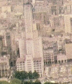 Edificios ALEA (adelante) y ALAS (atrás). Detalle de una vista panorámica de la ciudad de Buenos Aires desde la zona de Puerto Madero, 1980.